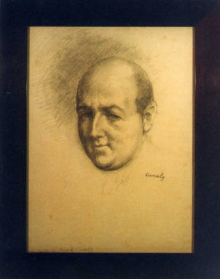 Retrat de Josep Maria de Sagarra, dibuixat en carbó per Ricard Canals i Llambí